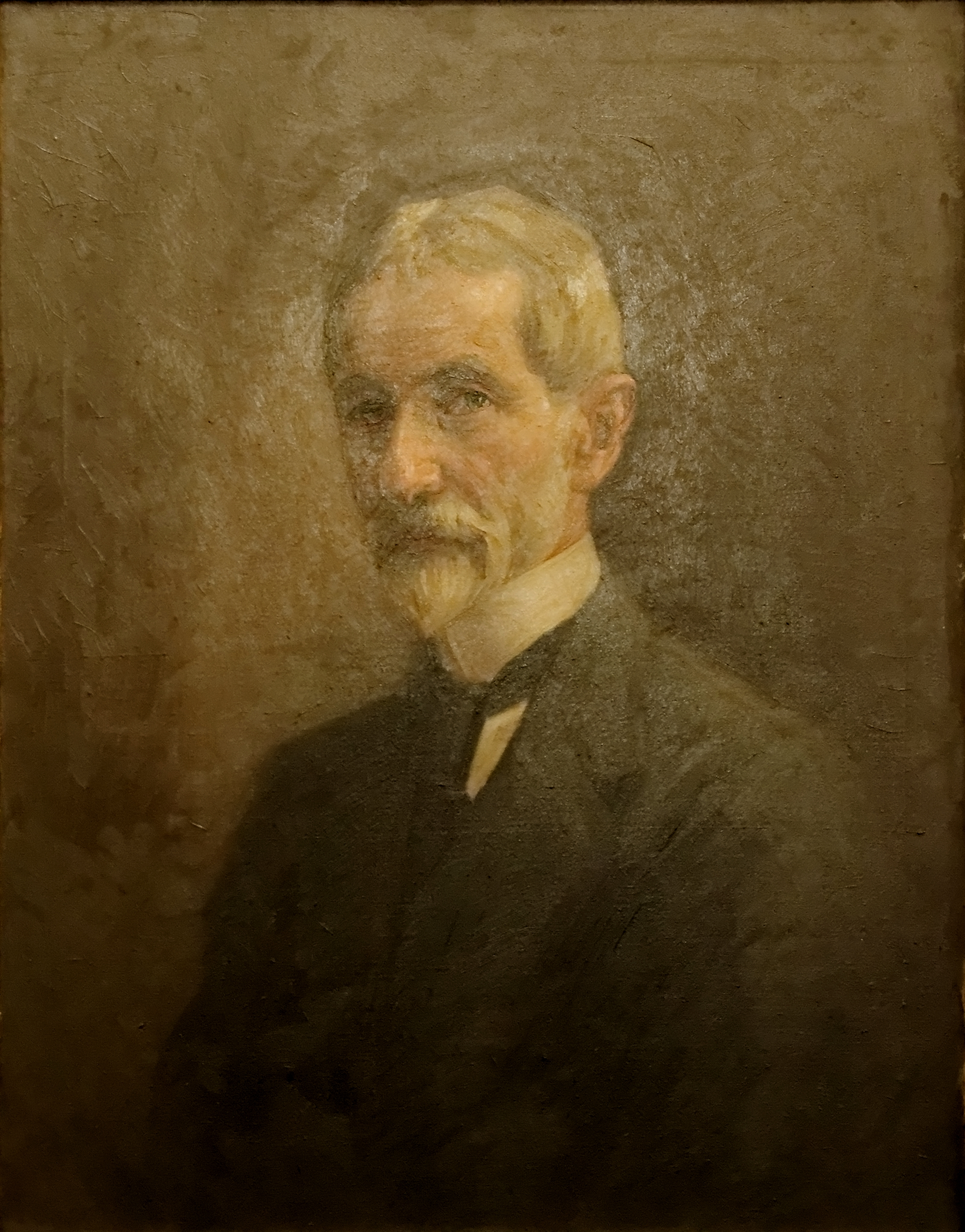 Alexandru Averescu, Anomyme. Exposé au palais Cotroceni Bucarest